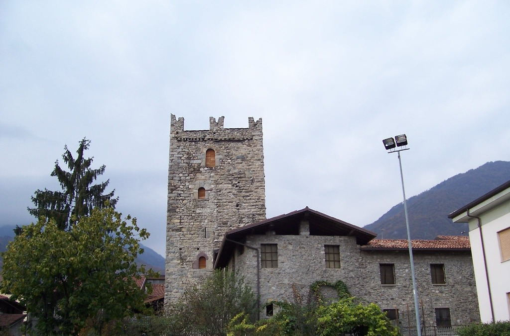 Tower, Cividate, Val Camonica, Italy